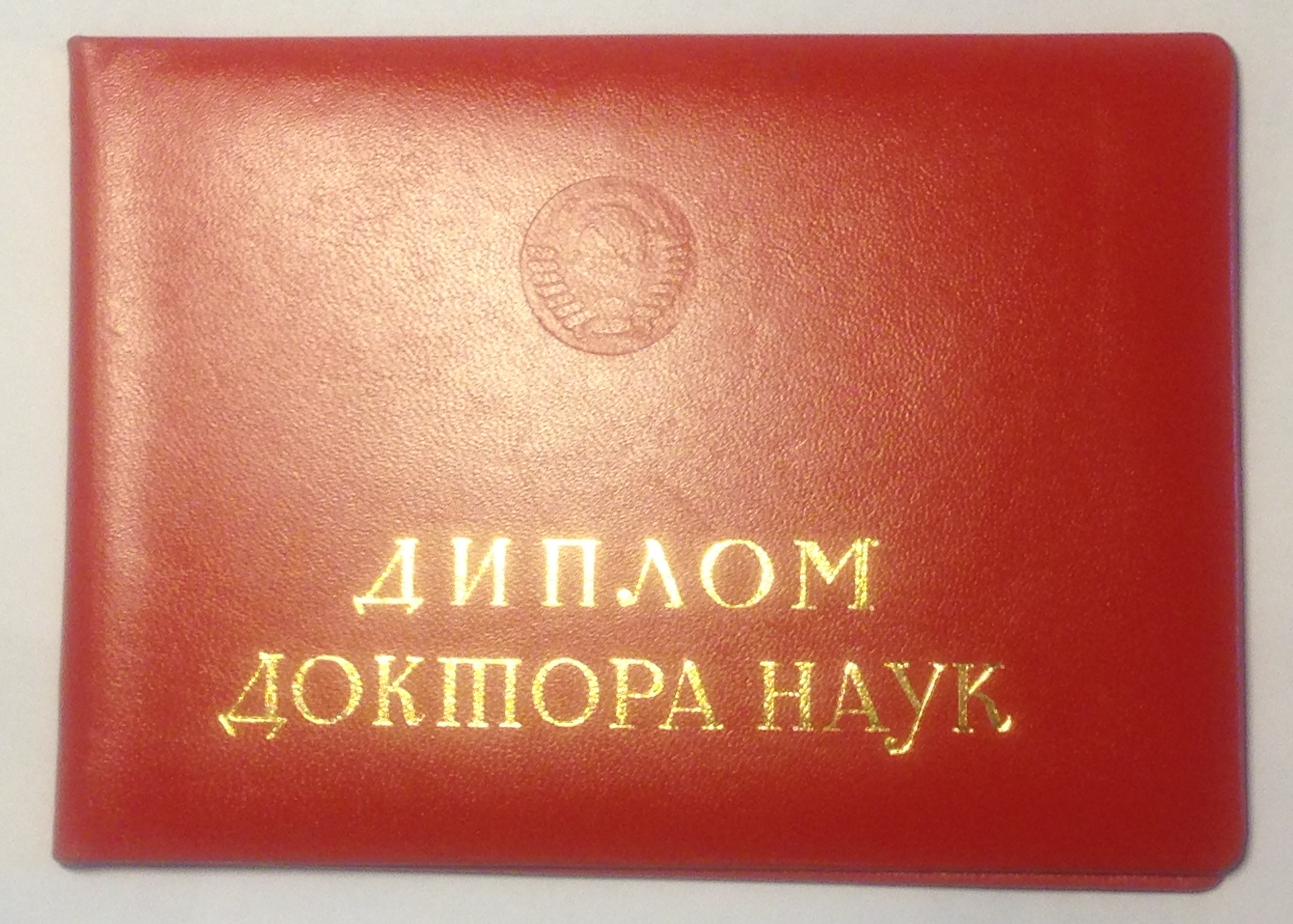 Диплом доктора наук, выдаваемый ВАК